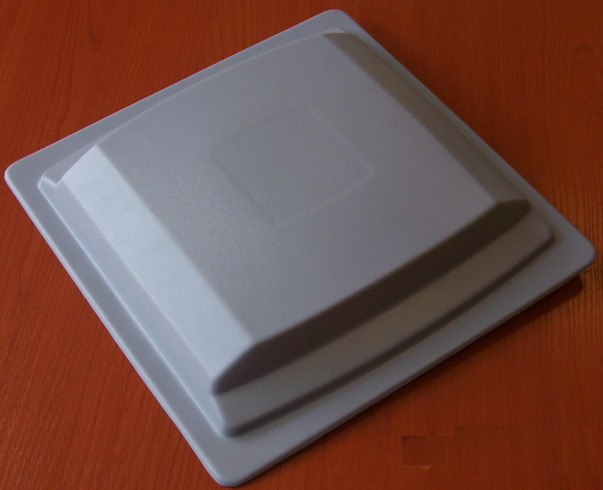 rfid antenna